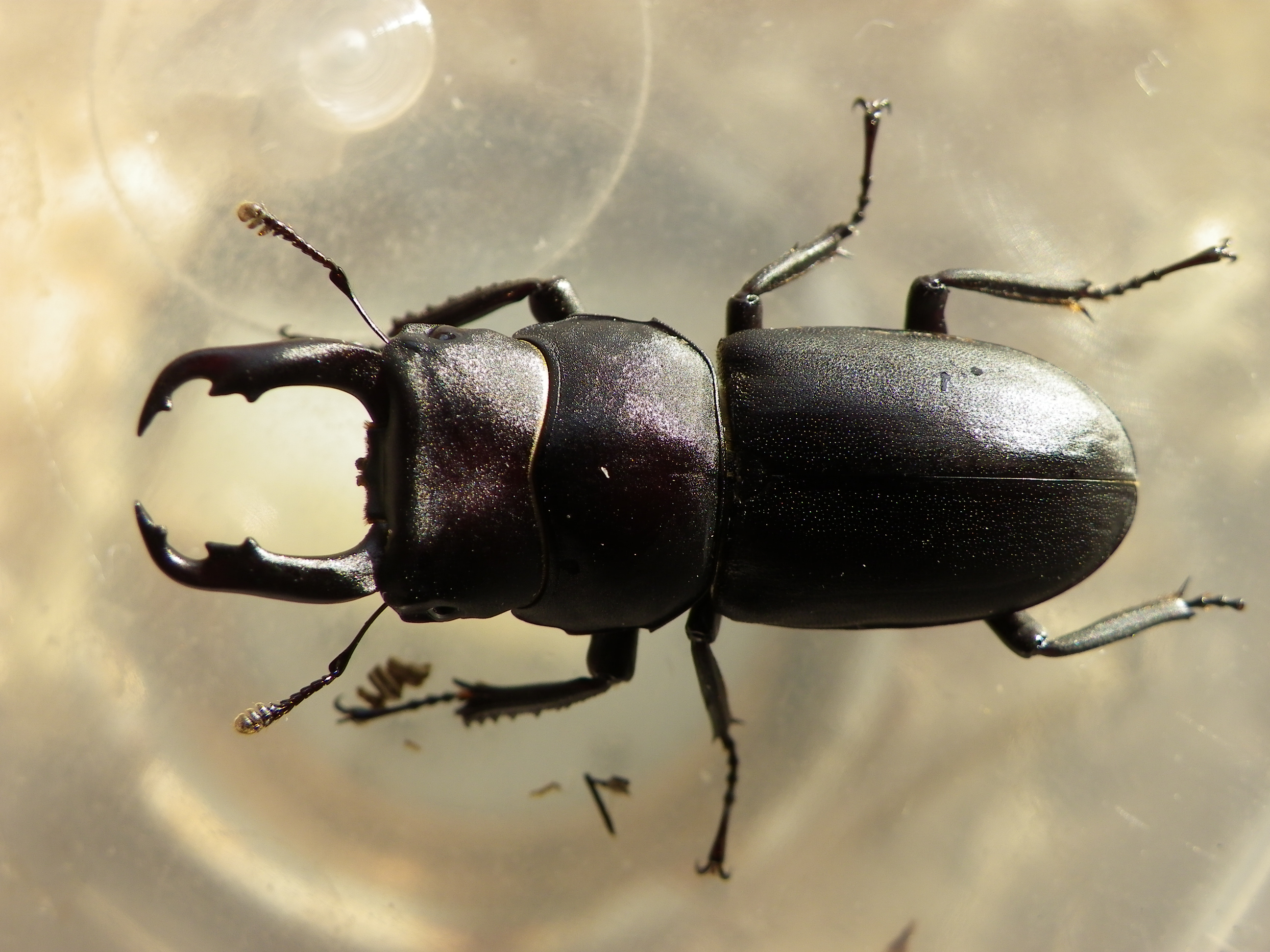 スジクワガタのオス。endingokが撮影しました。